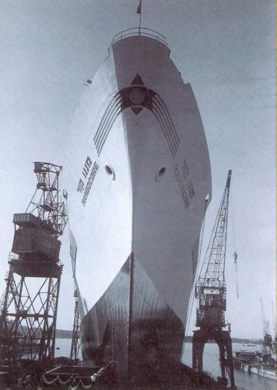 השקת הספינה מנגו קור